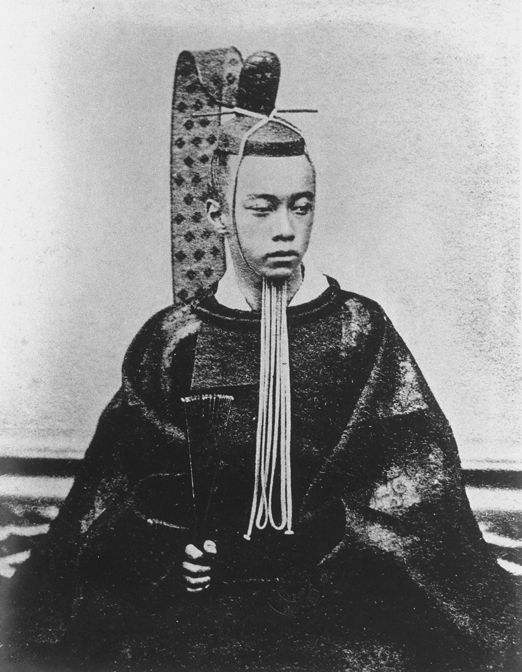 Portrait of Tokugawa Akitake (徳川昭武, 1853 – 1910)